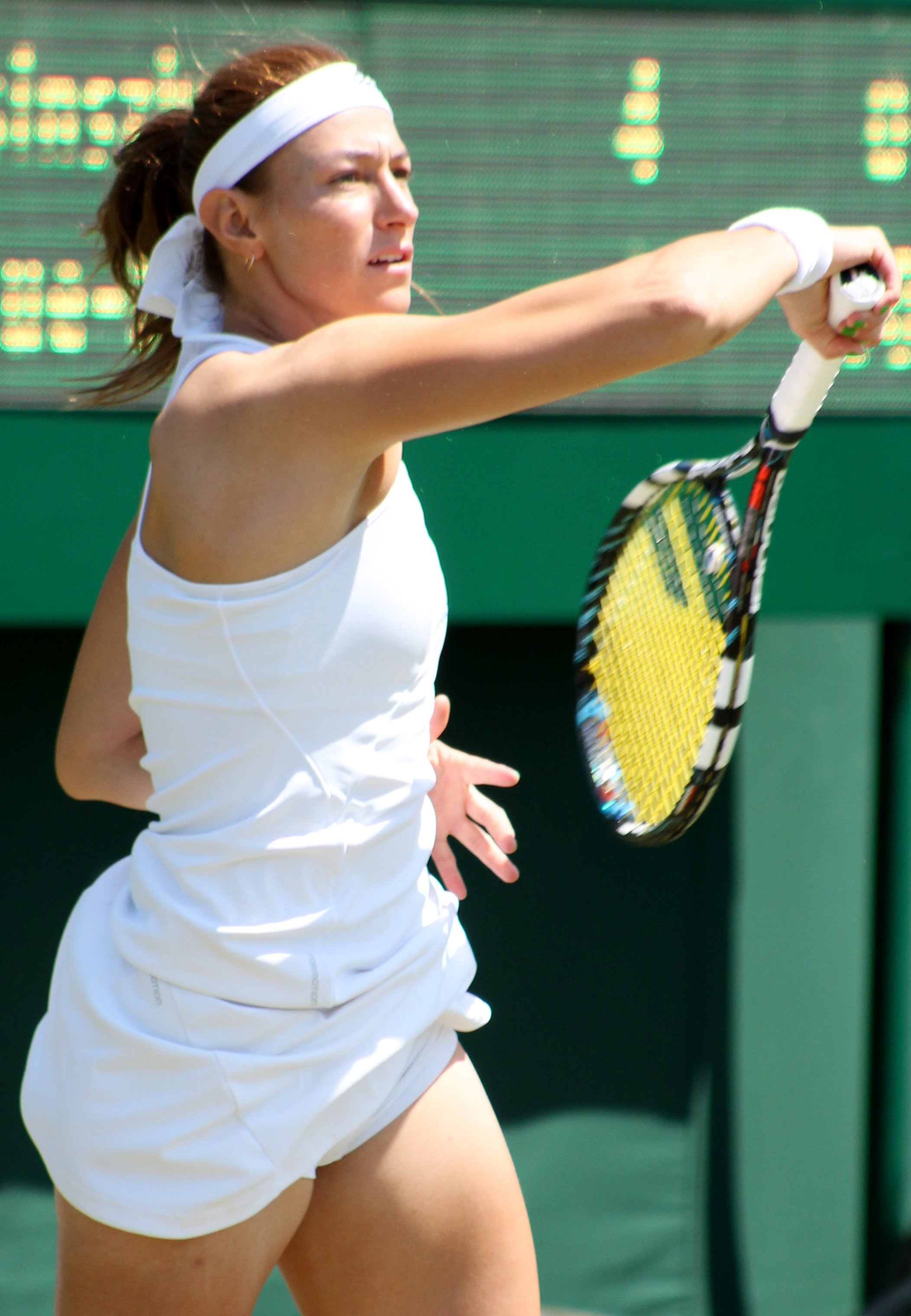 Duque Marino WMQ14 (2)